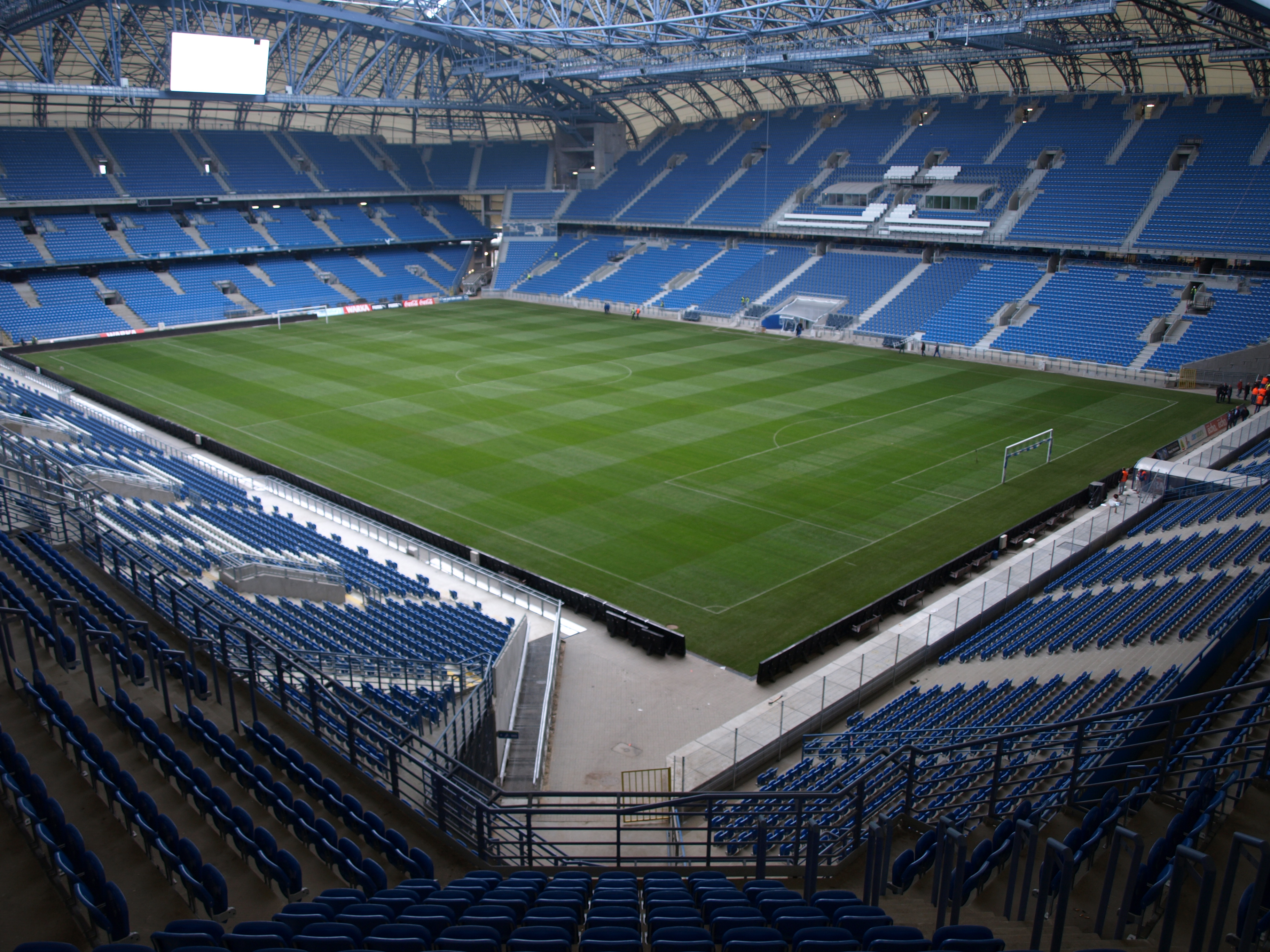 Stadion Lecha Poznan